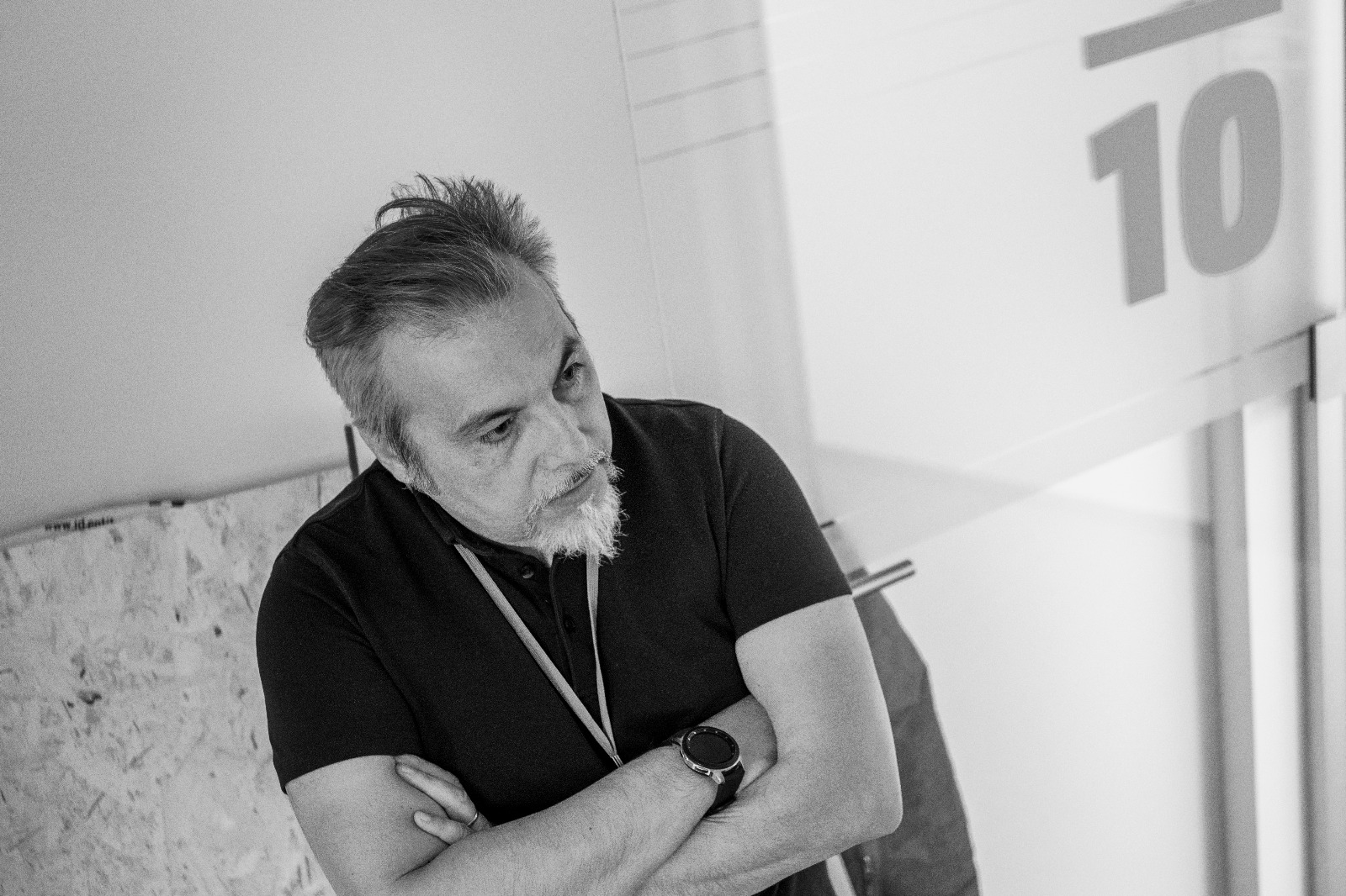 immagine